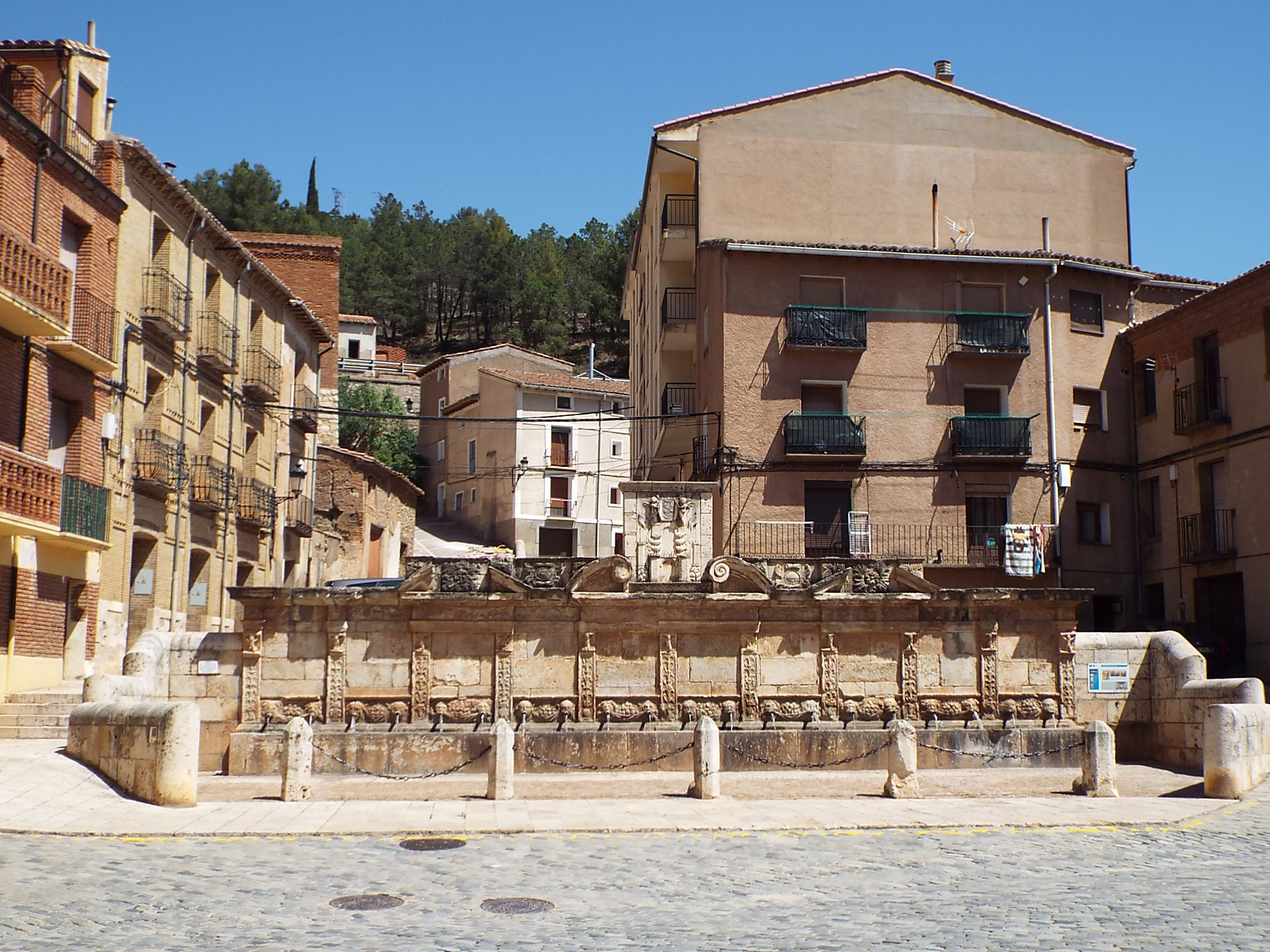 Fuente de los veinte caños en Daroca, provincia de Zaragoza, España.